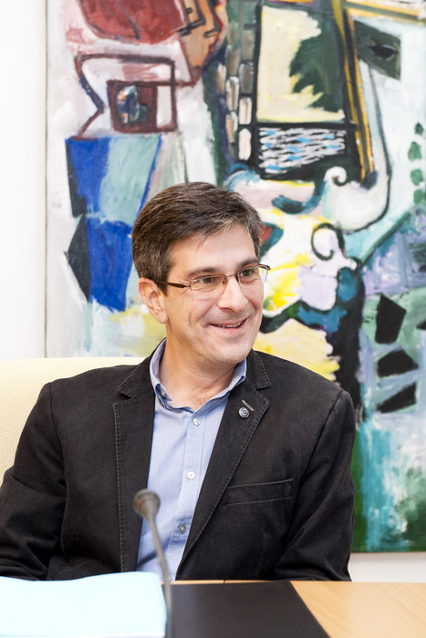 Mikel Arana reunido con el lehendakari Patxi López (27 de octubre de 2011) durante la ronda de contactos con los partidos políticos posterior al cese de actividades de ETA